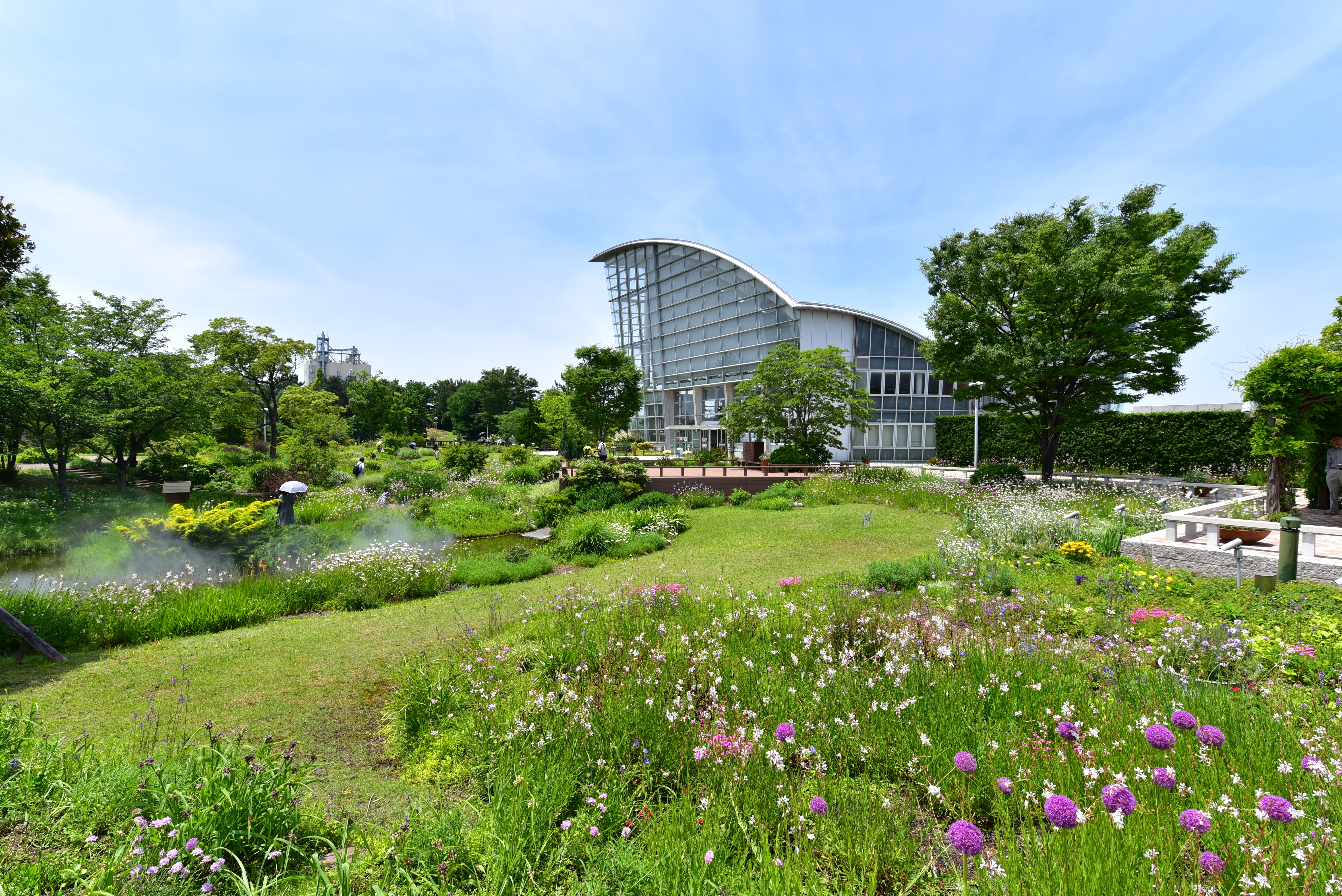 ブルーボネット園内